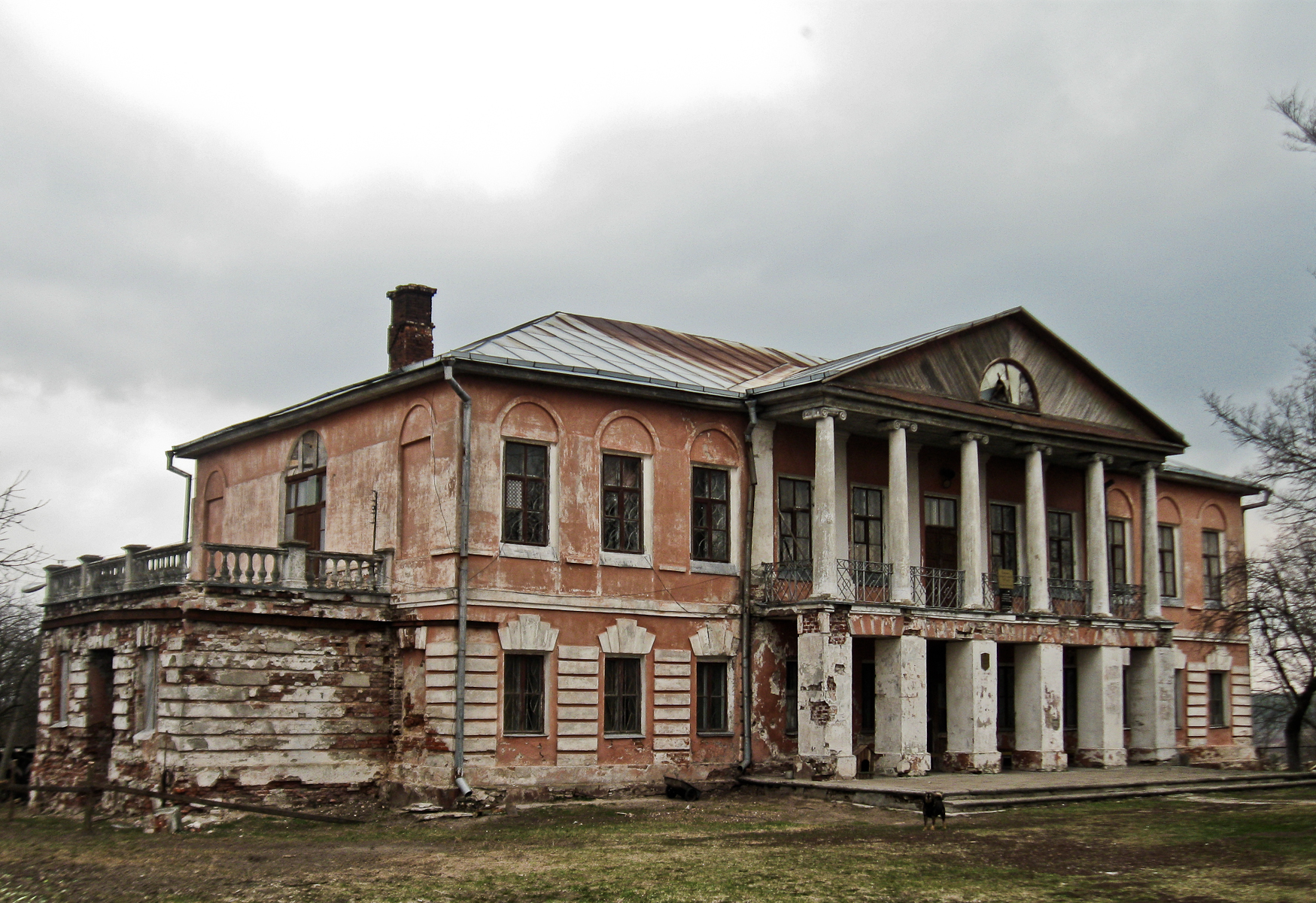 Беларуская (тарашкевіца): Комплекс былой сядзібы: палац, гаспадарчыя пабудовы, парк. в. Хальч This is a photo of Belarusian heritage monument. Reference number: 312Г000182 ( WLM)